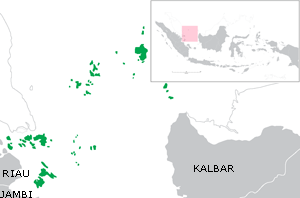 made by Borgx for Indonesian wikipedia